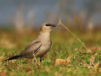 Small Pratincole (Glareola lactea)